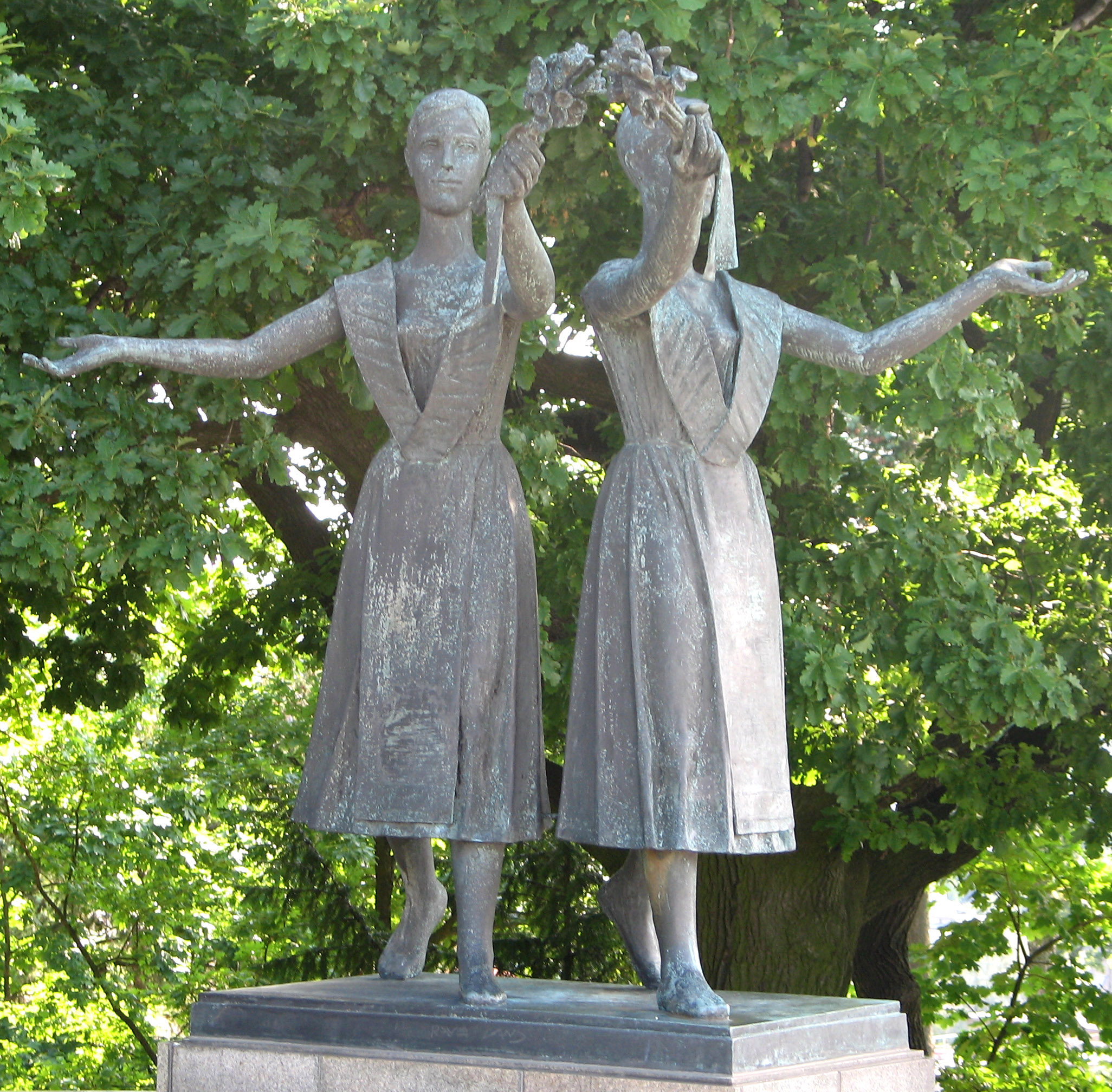 Bronzová plastika na bratislavskom Slavíne. Autorom plastíky s nazvom "Vďaka" je Jozef Kostka.